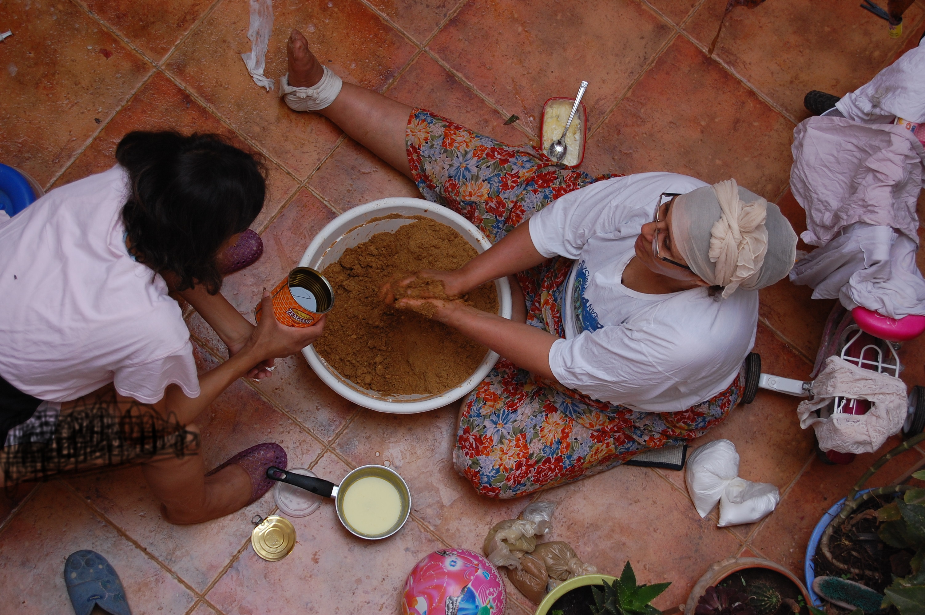 Walon: Aprustaedje do sellou